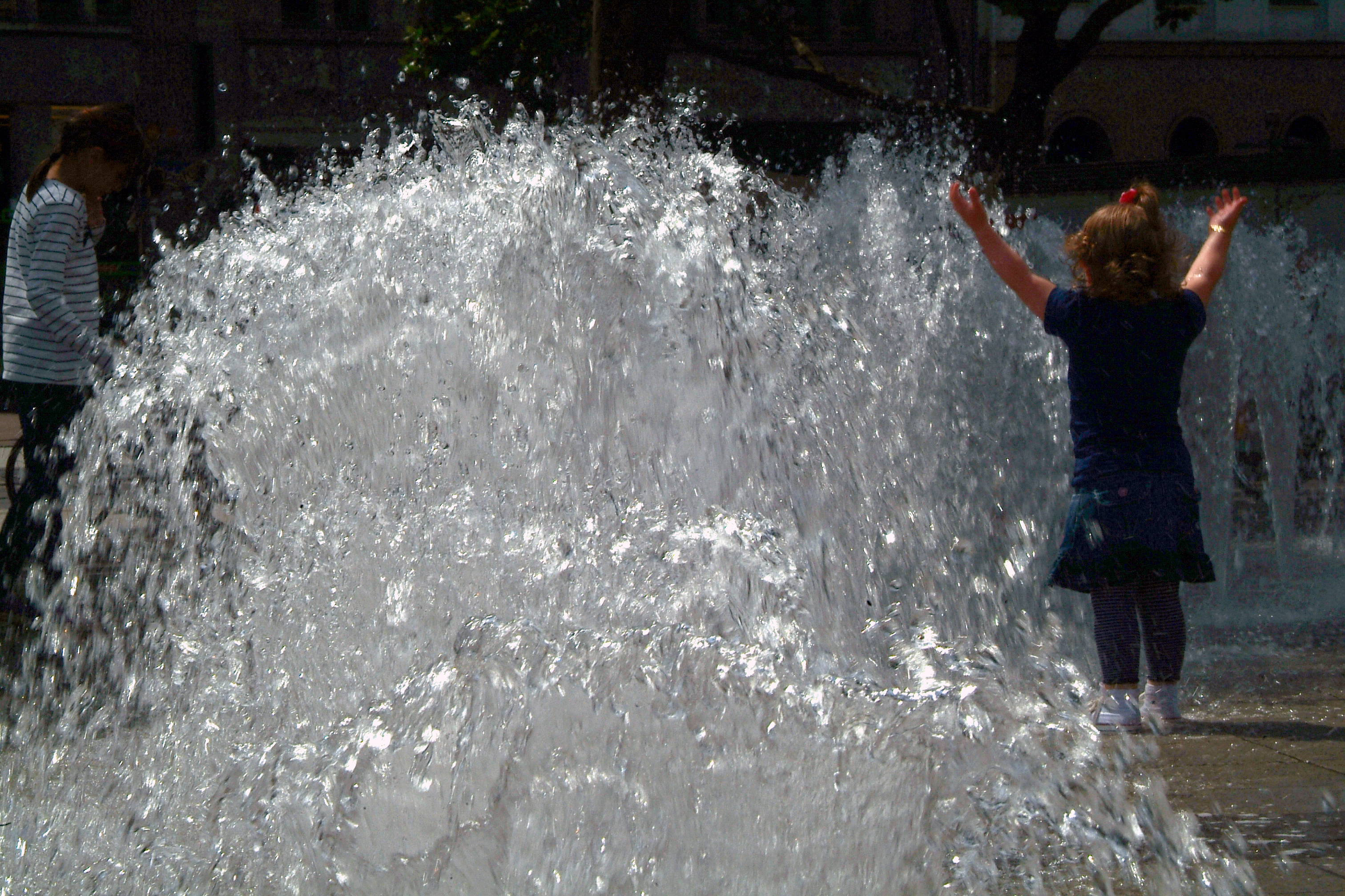 Der HAZ-Brunnen auf dem Ernst-August-Platz vor dem Hauptbahnhof Hannover besteht aus zwei sichelförmigen, ebenerdigen Brunnen vor den Parktaschen beiderseits des Ernst-August-Denkmals ...